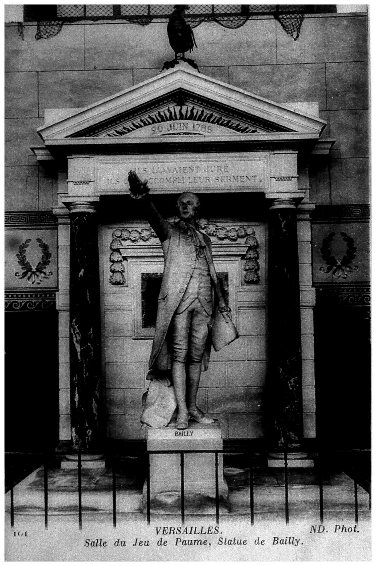 cf titre.